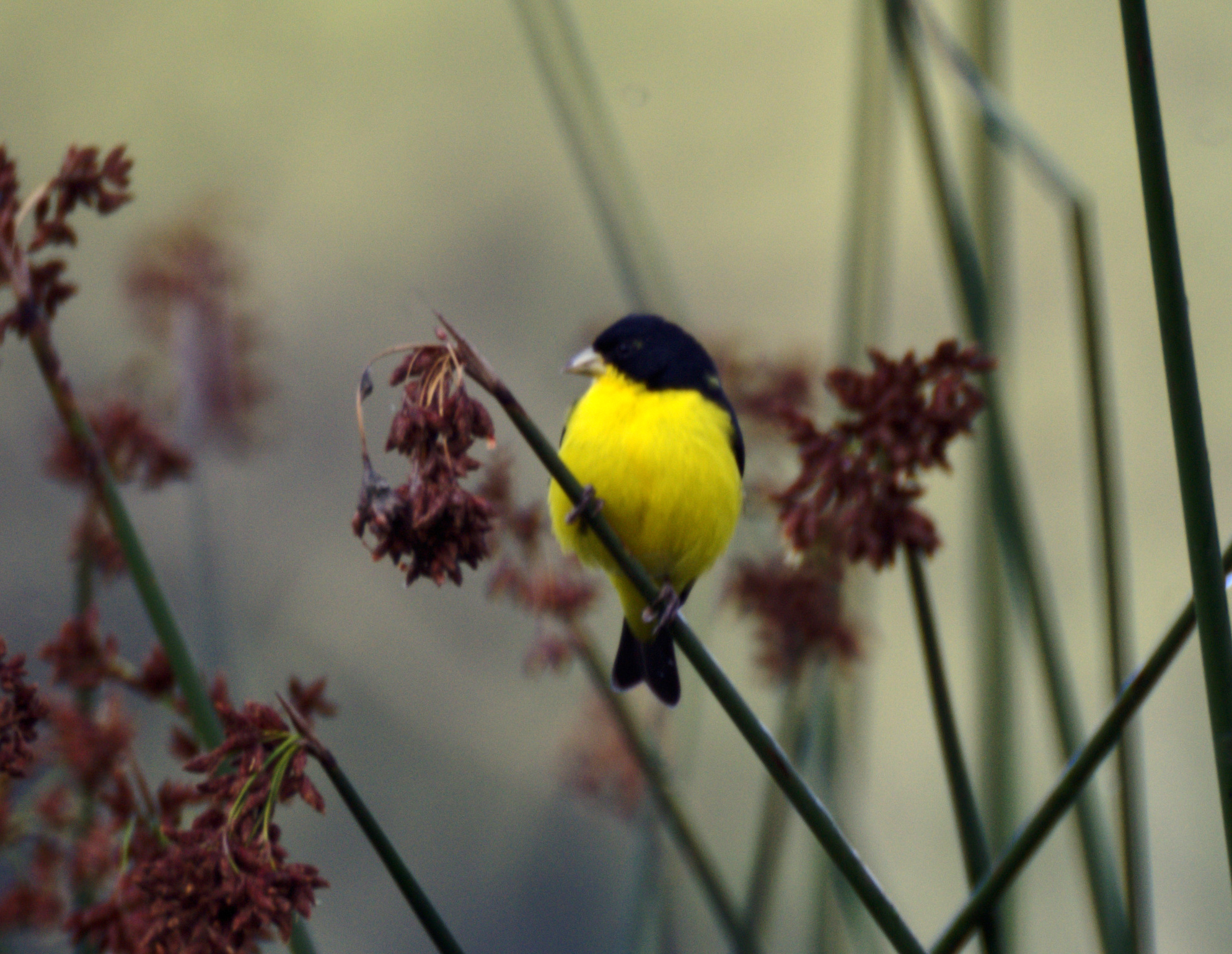 Lesser Goldfinch Spinus psaltria colombiana, Distrito Especial, Bogotá, Colombia.